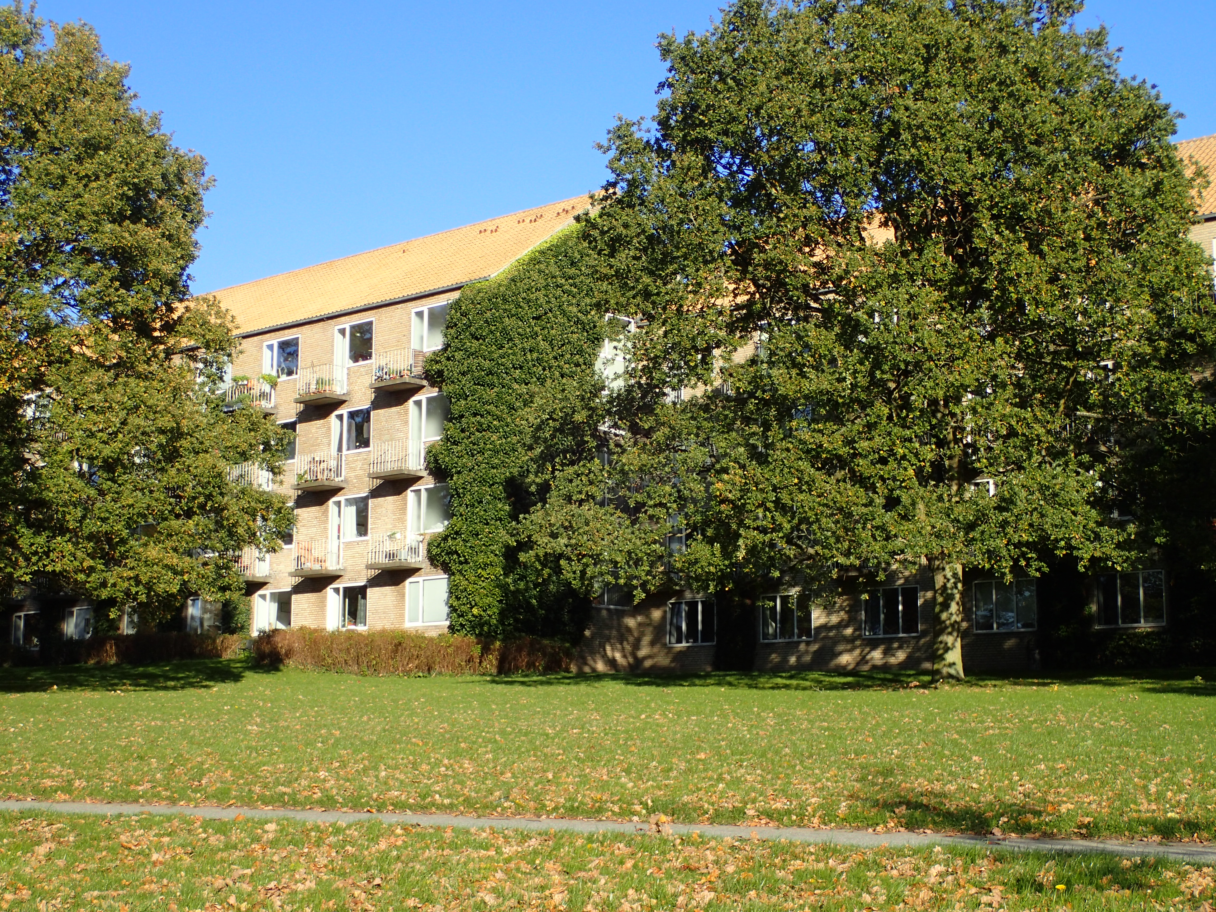 Parkkollegierne, blok 8 og 9.